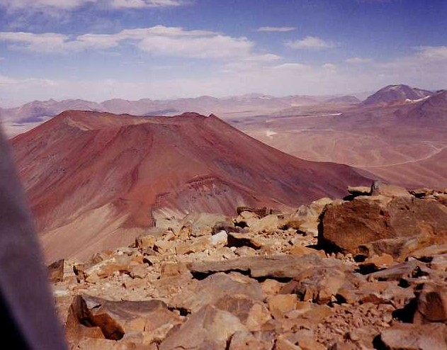 Volcano Juriques